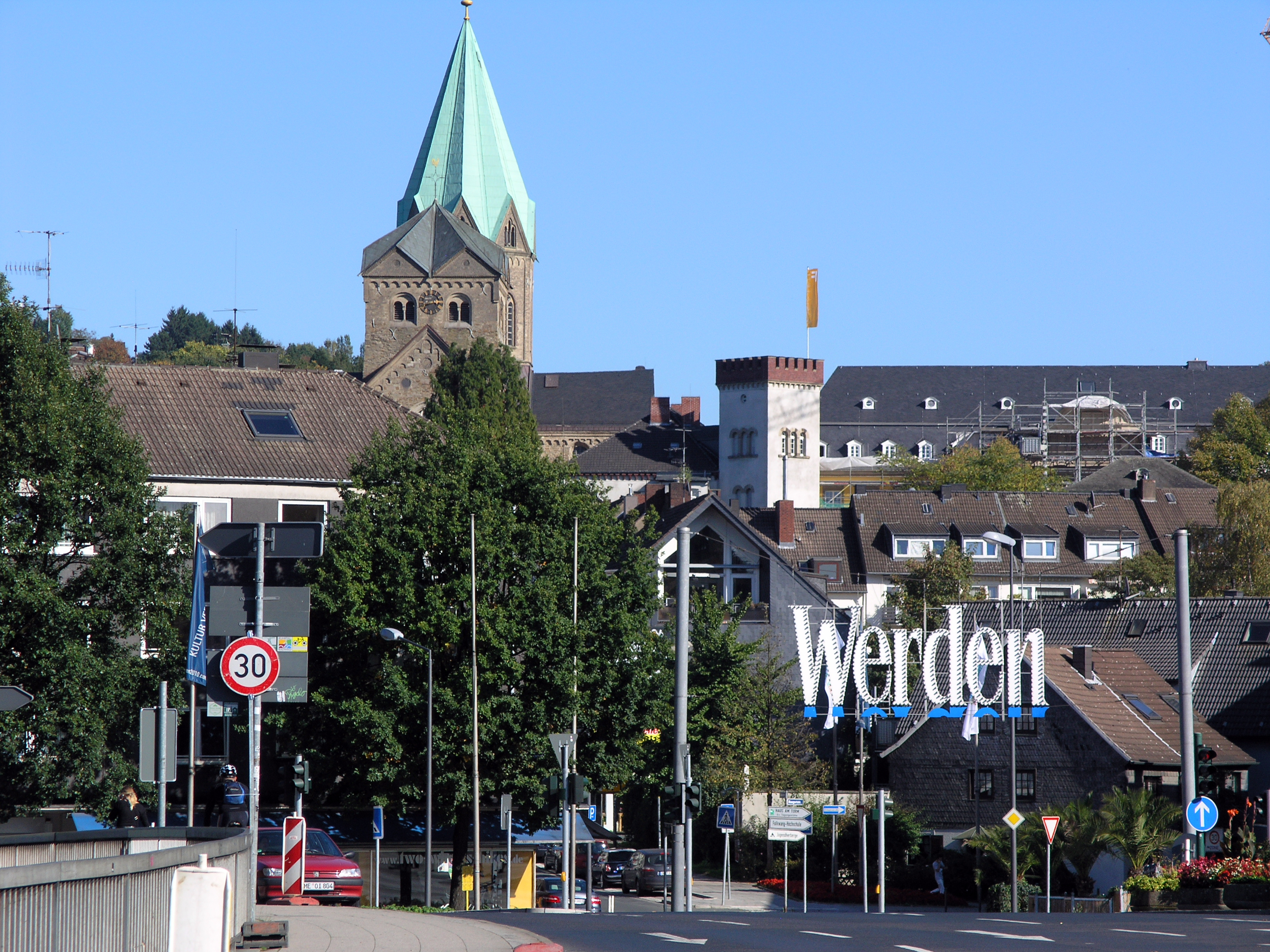 Северный Рейн - Вестфалия, Эссен - вид на Верден с Верденского моста